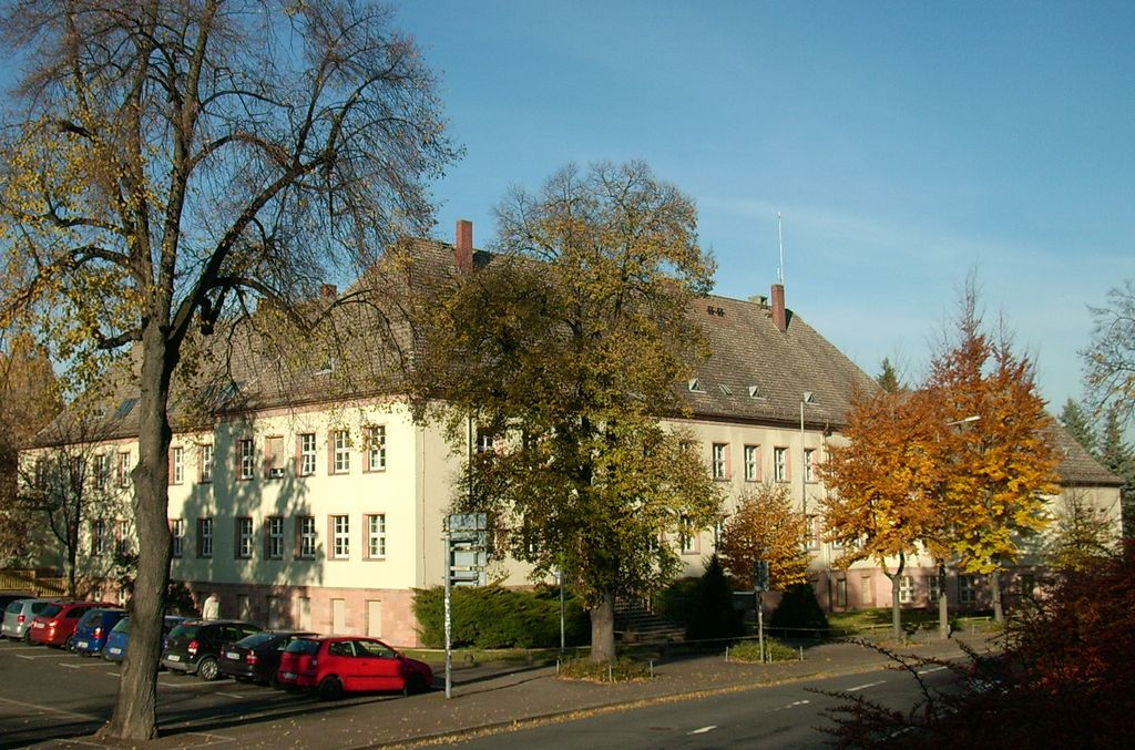 Gebäude der Amtshauptmannschaft Oschatz, heute Außenstelle des Landratsamtes Nordsachsen